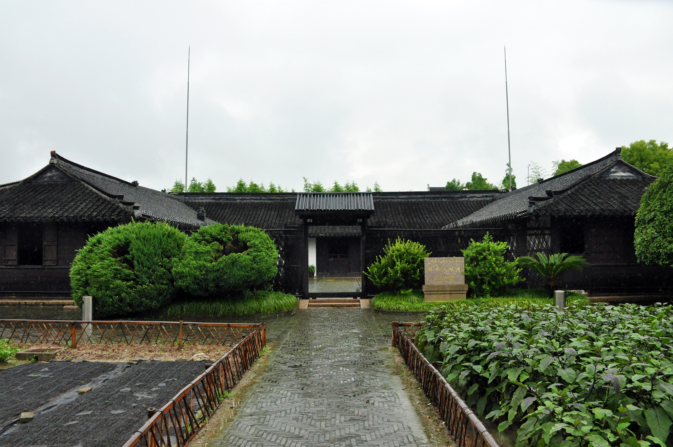 张闻天故居 浦东新区祝桥镇邓三村北张家宅 近代